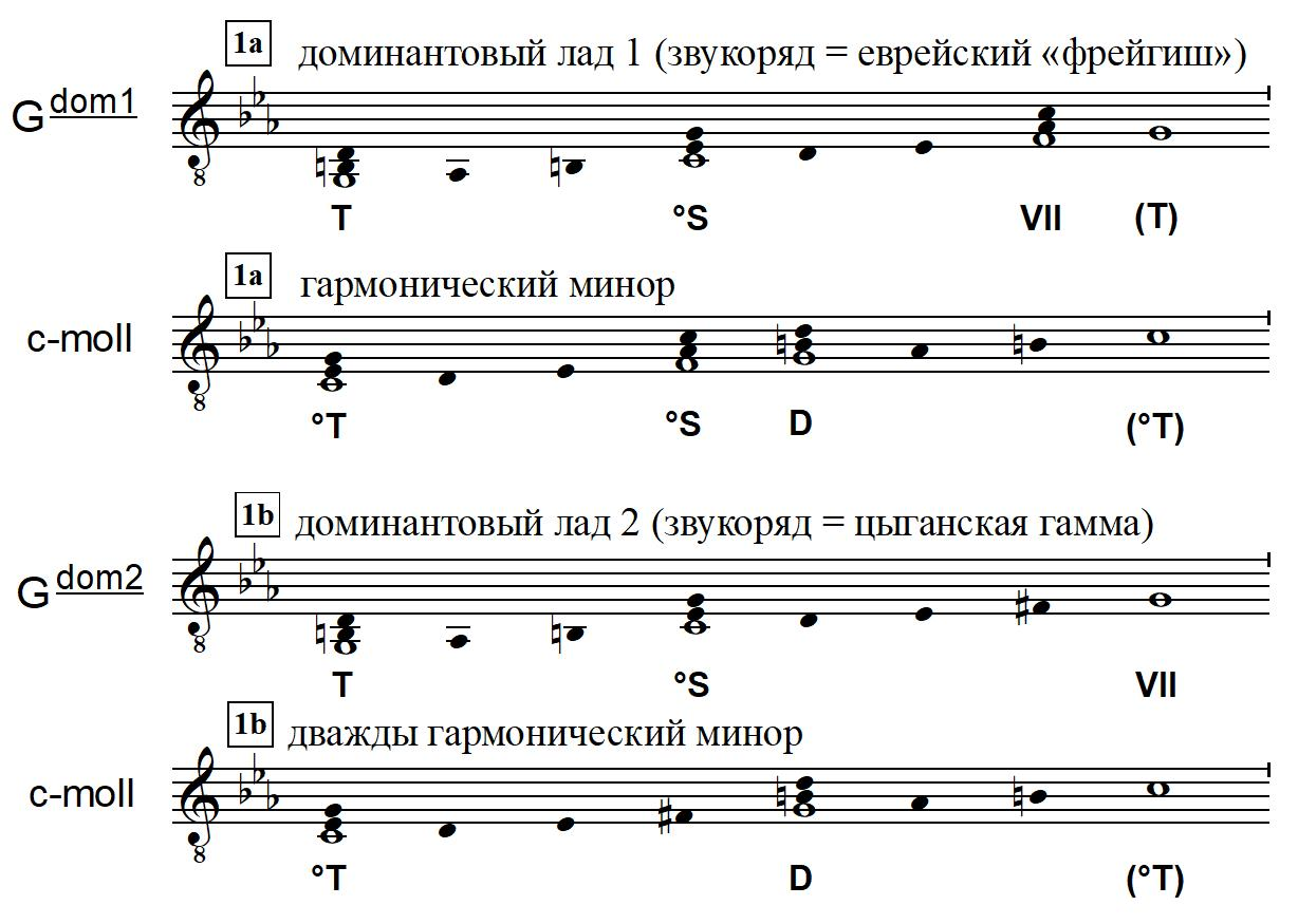 Схема доминантового лада (2 варианта)